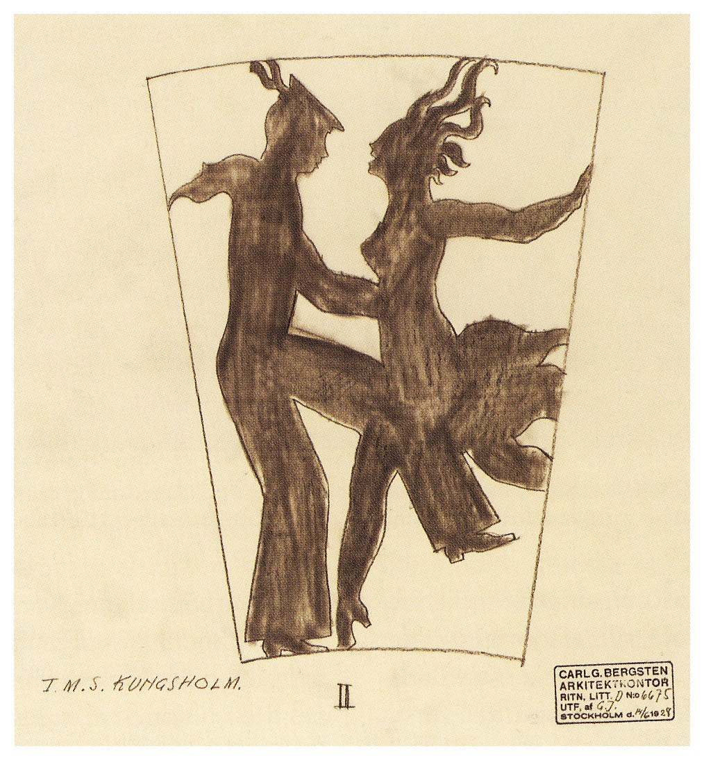 M/S Kungsholm 1928, inredningsritning av Carl Bergstens arkitektkontor 1927